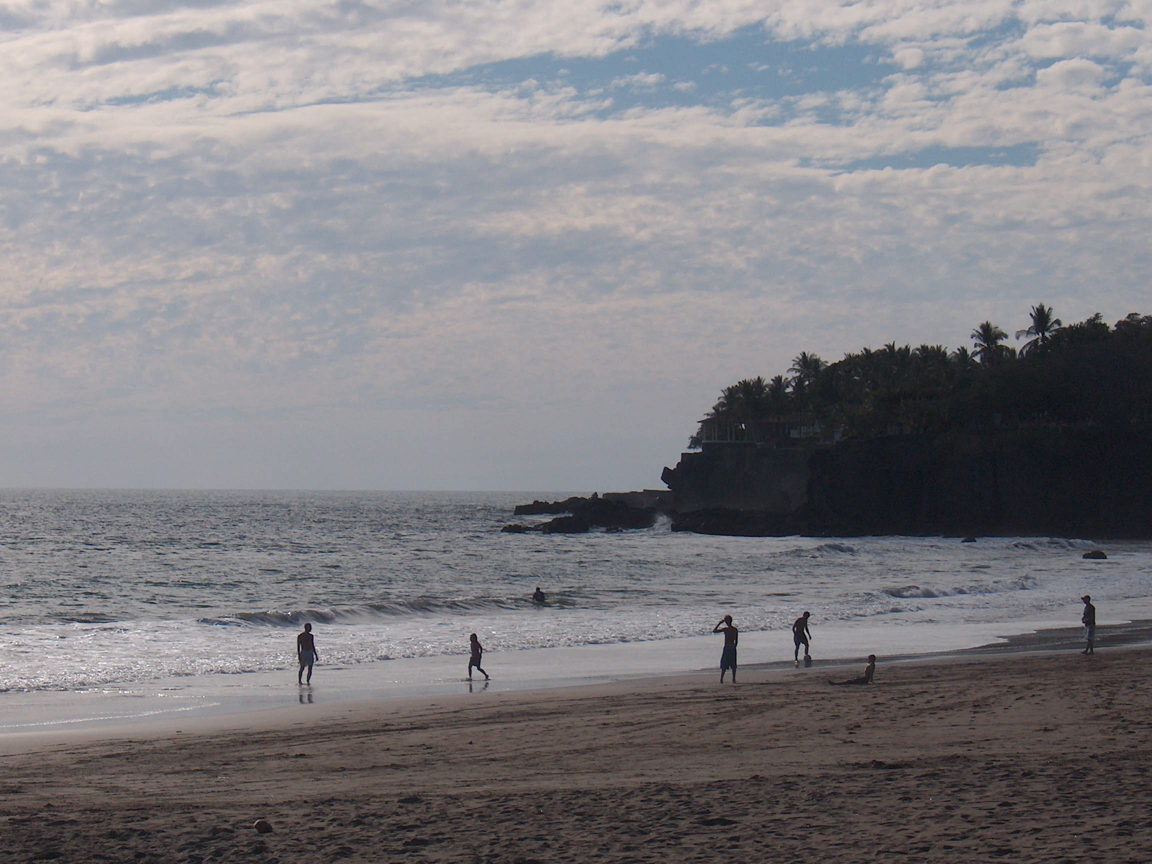 Beach in La Libertad Department, El Salvador